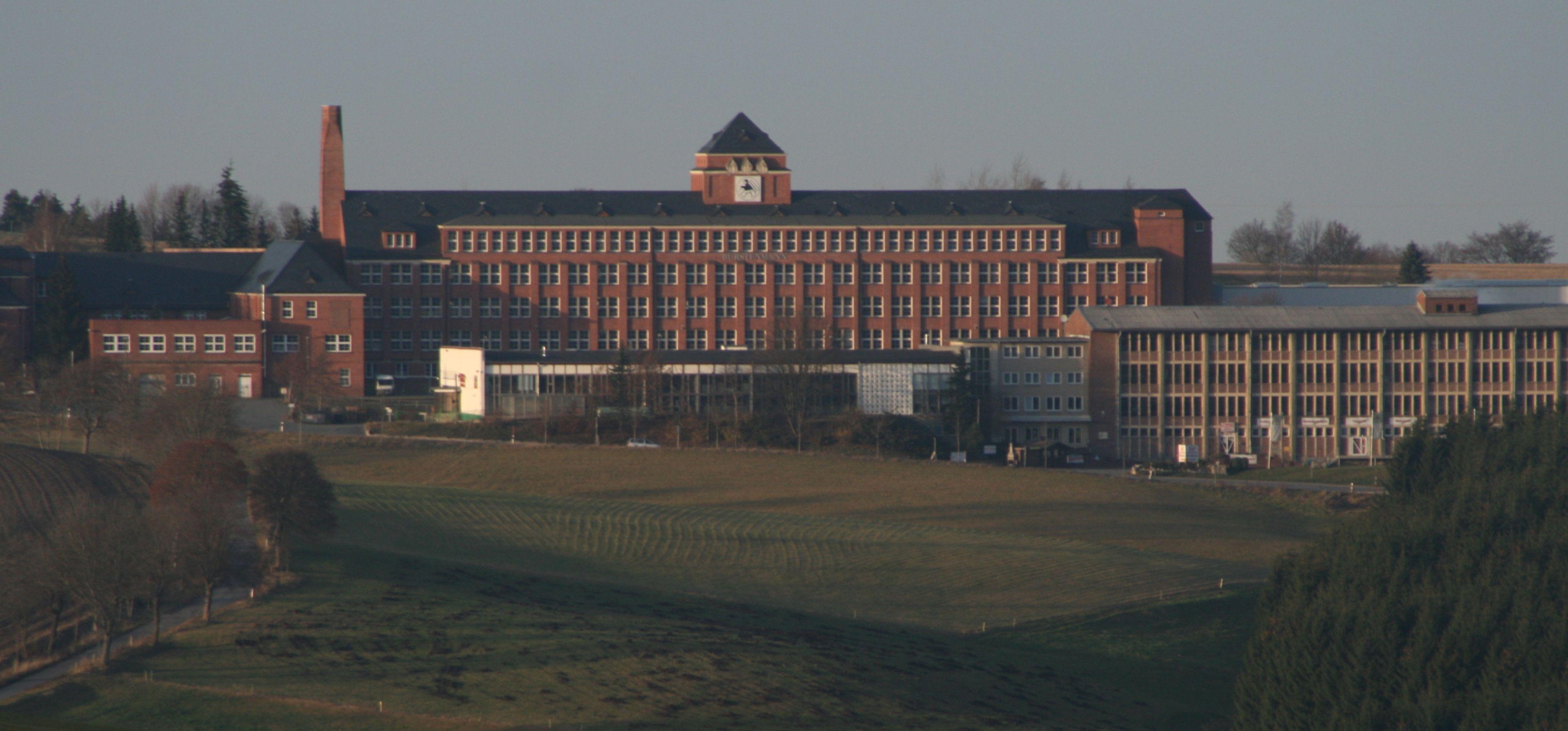 Bürstenfabrik in Stützengrün, Erzgebirge, Sachsen; erbaut 1925 von der Großeinkaufs-Gesellschaft Deutscher Consumvereine mbH (GEG) (Sitz in Hamburg) für die Verlagerung ihres zuvor in Schönheide bestehenden Betriebs; vorne rechts der Erweiterungsbau aus den 1960er Jahren